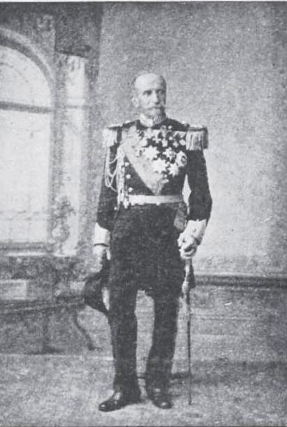 griechischer Militär 19. Jahrhundert